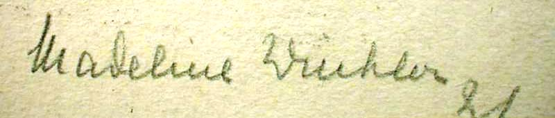 Signatur von Madeline Winkler, später Madeline Winkler-Betzendahl